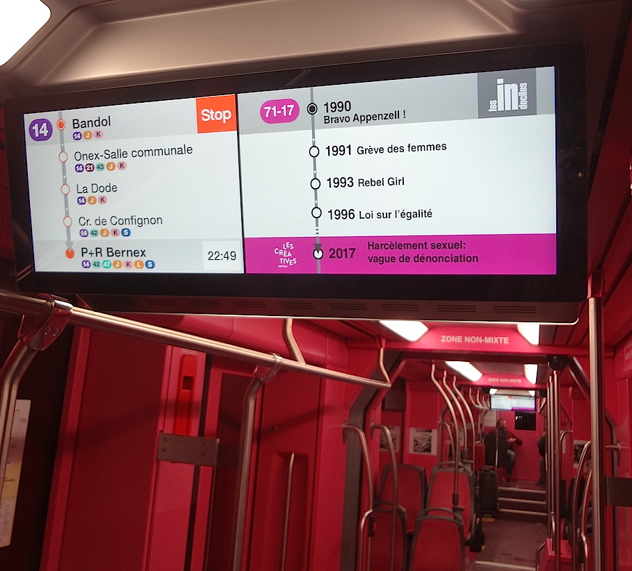 Exposition du collectif Les Indociles, dans le tram Monochrome Rose de Pipiloti Rist. Chronologie féministe sur la ligne 71-17 : « 1990 Bravo Appenzell ! – 1991 Grève des femmes – 1993 Rebel Girl – 1996 Loi sur l'égalité ... 2017 Harcèlement sexuel : vague de dénonciation » (partie de l'affichage normalement réservé à la publicité).